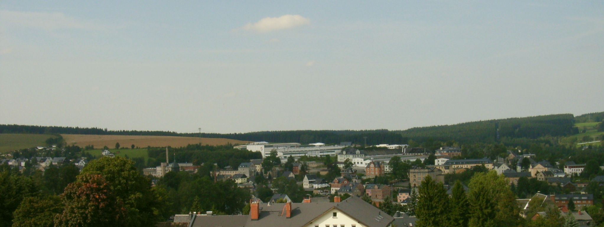 Grünhain, Ansicht aus Richtung Fürstenbrunner Straße.